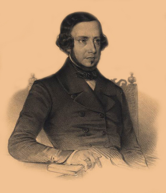 Retrato do escritor português Almeida Garrett.